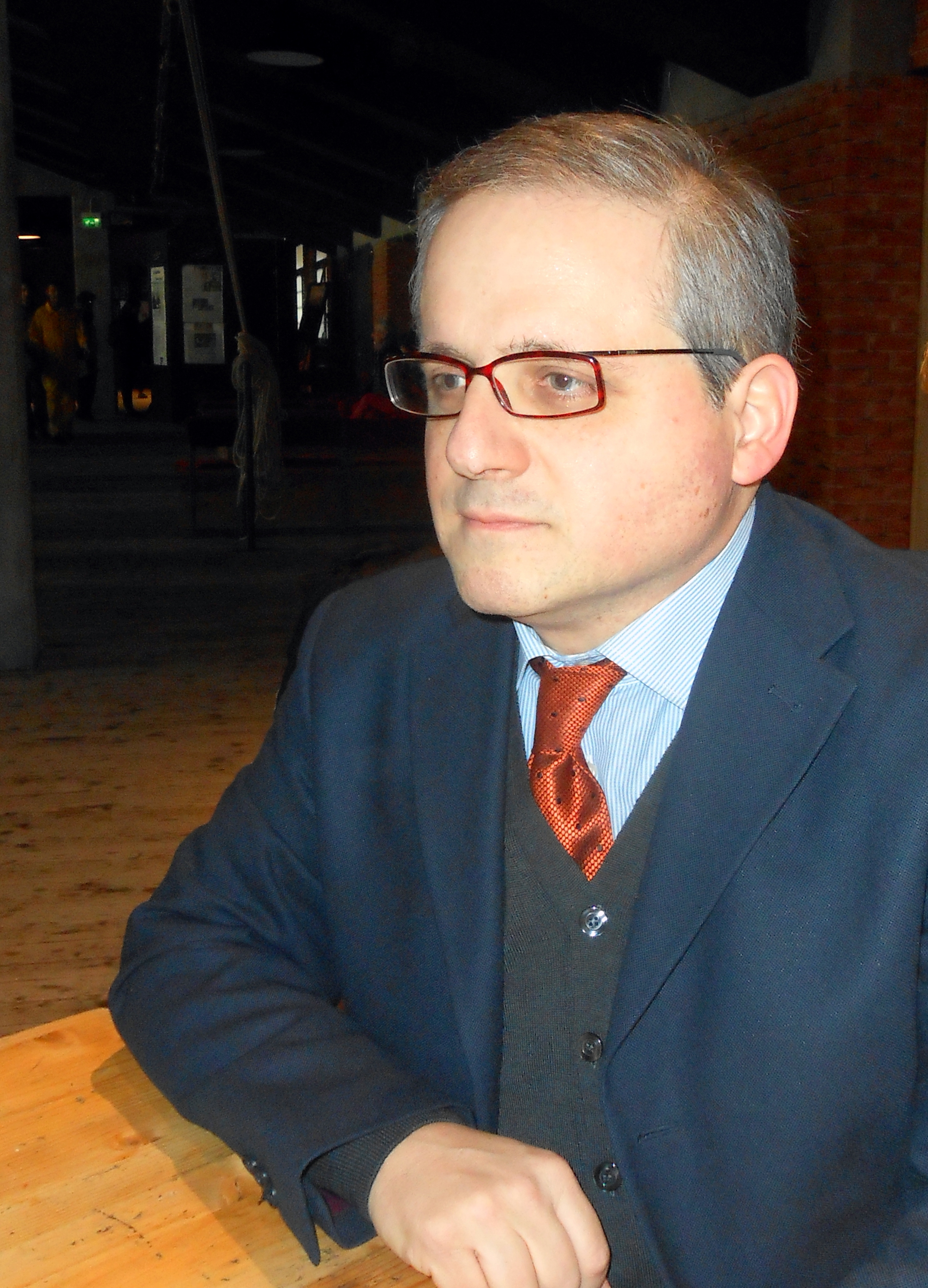 Claudio Vercelli fotografato al Teatro "Franco Parenti" di Milano in un momento di pausa della terza conferenza (di una serie di cinque) dal tema: Storia dello Stato d'Israele - 5 marzo 2017